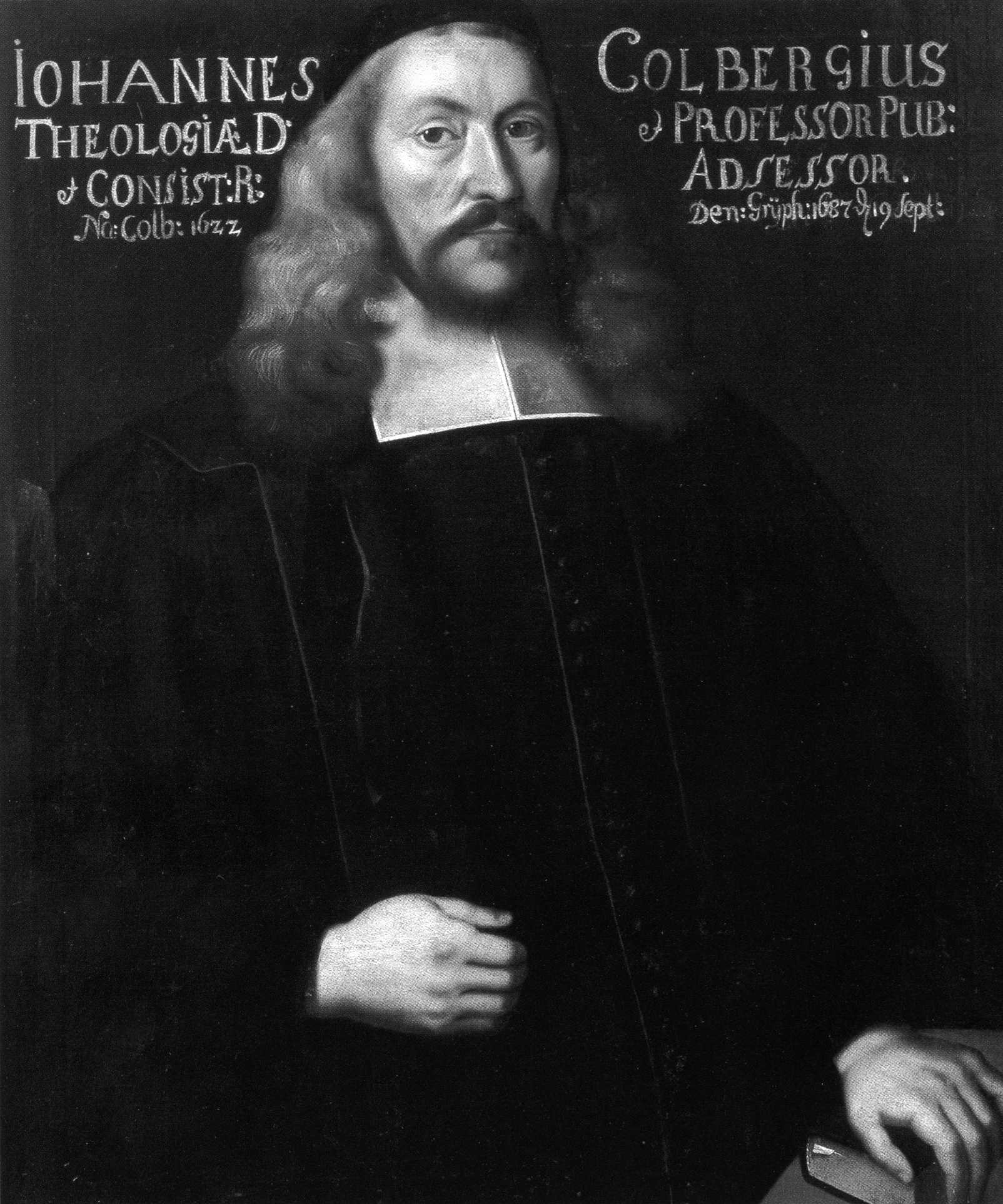 Bildnis des Greifswalder Professors Johannes Colberg (1623–1687)